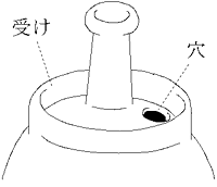 Abura-tokkuri (油徳利, Japanese oil bottle)